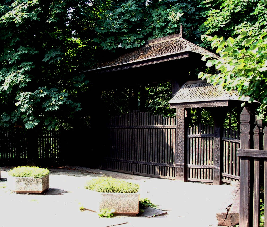 Intrarea in gradina botanica din Iasi